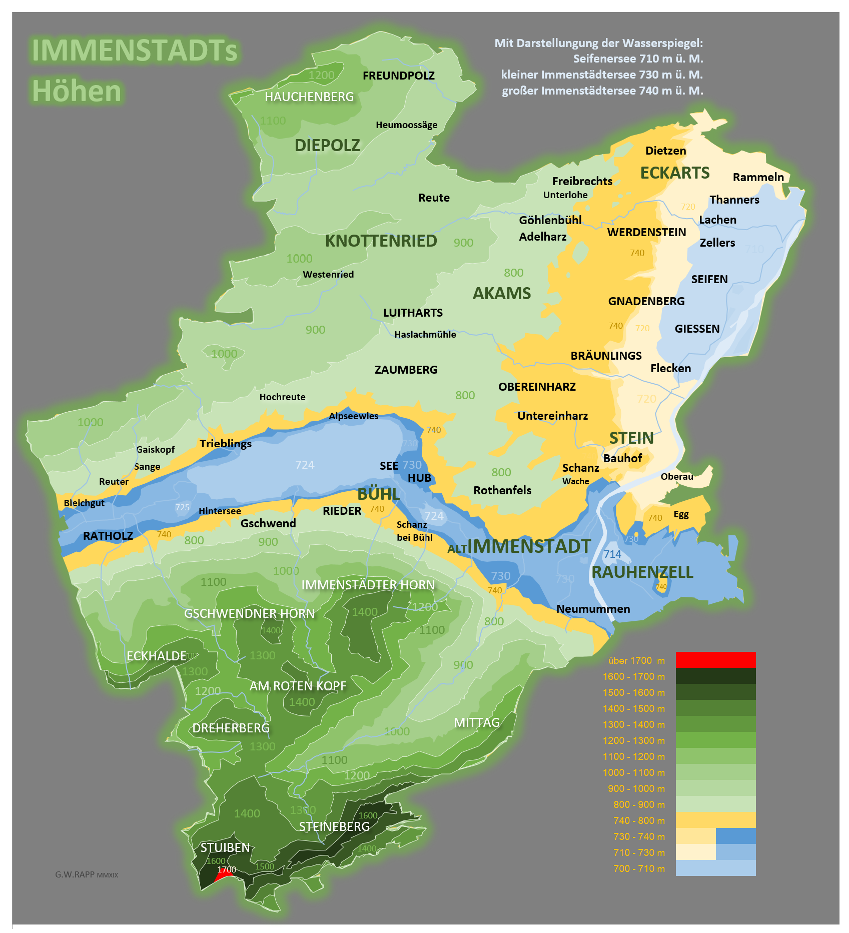 Darstellung von diversen Höhenlinien in der Gemeinde Immenstadt im Allgäu